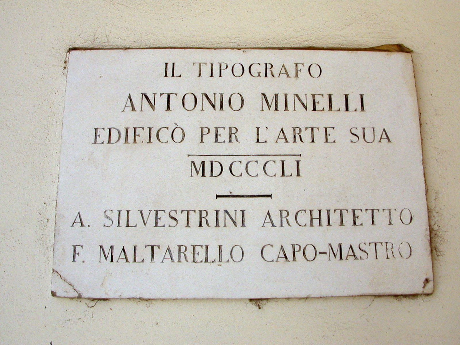 Lapide commemorativa del luogo dove Antonio Minelli collocò una sua tipografia: Via Domenico Angeli, angolo Via Antonio Minelli, Rovigo.